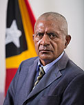 António dos Santos, Abgeordneter des Nationalparlaments Osttimors